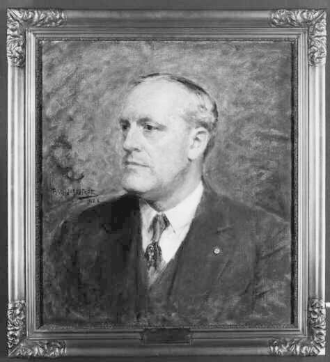 Porträt des schwedischen Kaufmann Hans Lagerlöf (1880-1952) gemalt 1926 von Axel Jungstedt